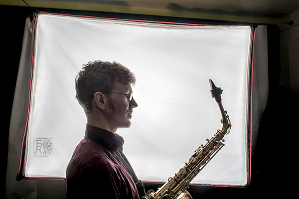 Saxophonist Leonhard Huhn